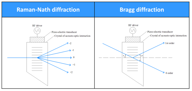 כאשר התדר המרחבי גבוהה (סדר גודל של MHz או GHz) אז המרחק בין ההפרעות קטן מאוד ביחס לעובי הכביש – ונקבל במקרה זה את אפקט Bragg, שבו מתקבל סדר 0 ועוד סדר נוסף שהוא דומיננטי (ניתן לראות בתמונה את ההשוואה בין תחומי תדרים שונים).